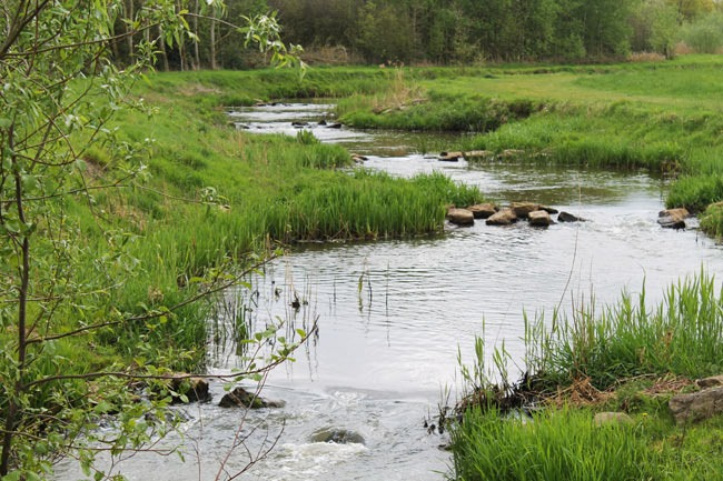 Visstrap in de Beerze